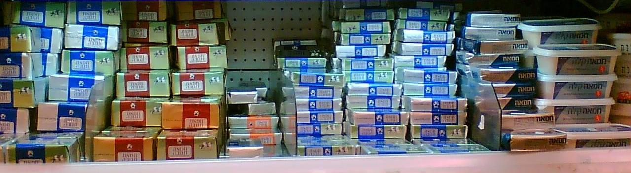 Butter for sale, In an Israeli supermarket